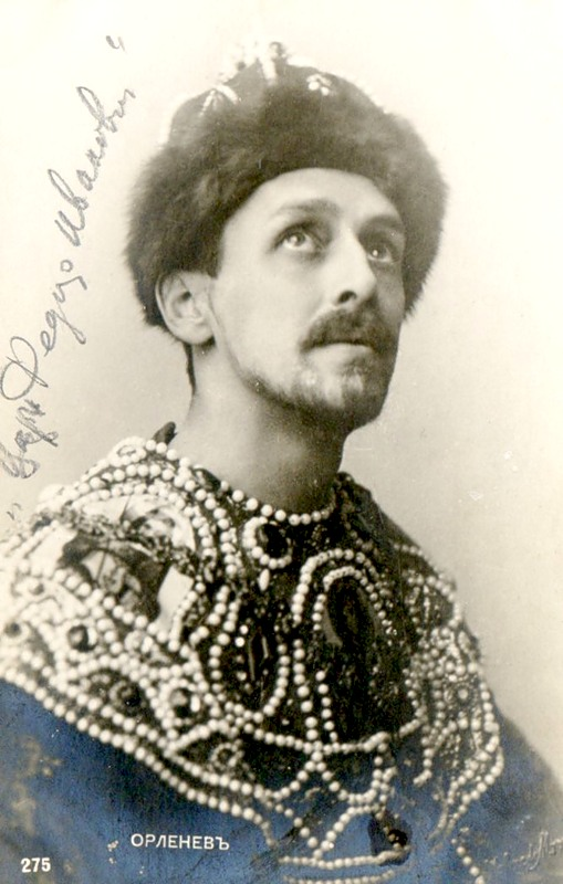 Павел Орленев в роли царя Фёдора Иоанновича в спектакле петербургского Малого театра